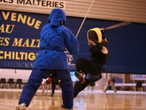 EM Kampf